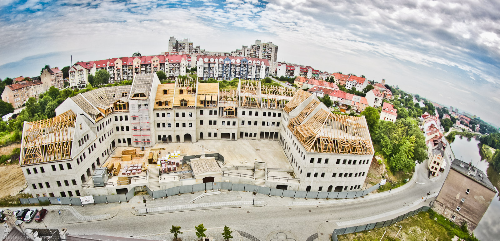 Plac pocztowy w budowie